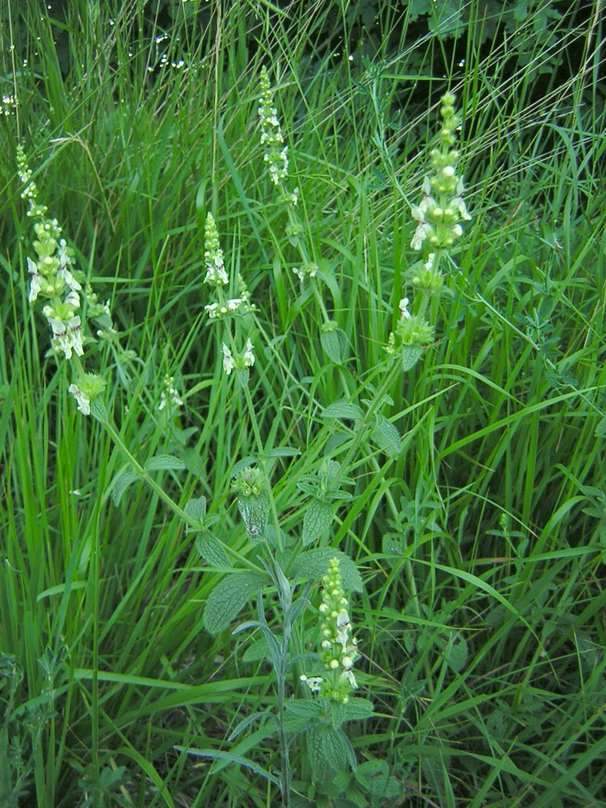 Stachys recta Joinville - Haute-Marne - France Source : [1]